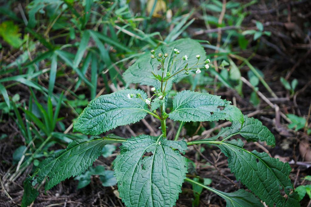 Adenostemma lavenia：ヌマダイコン 2010/09/26 和歌山県田辺市：Tanabe City. Wakayama pref. Japan